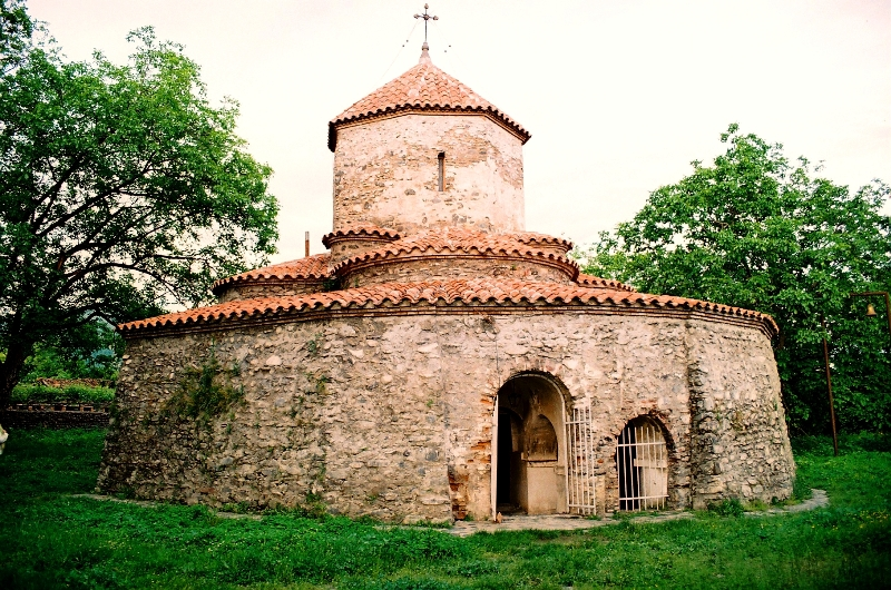 ძველი გავაზი